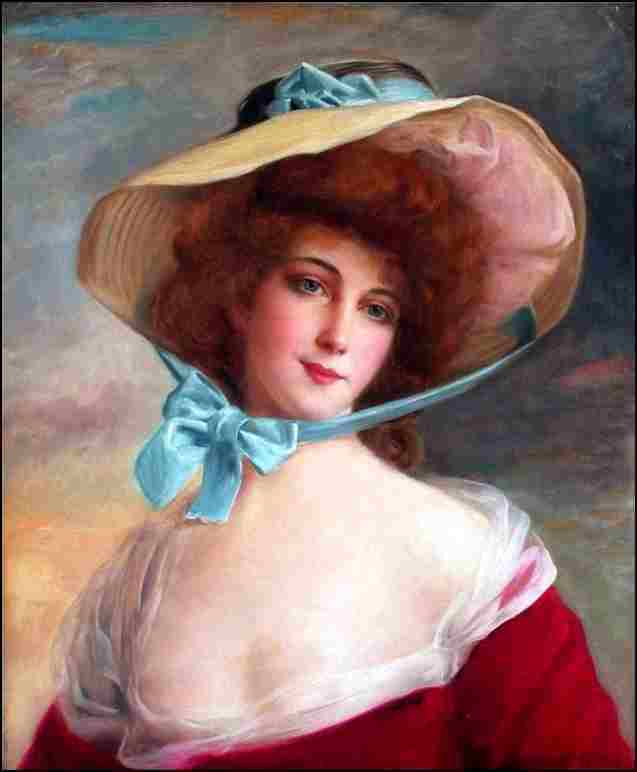 Chapeau au ruban bleu